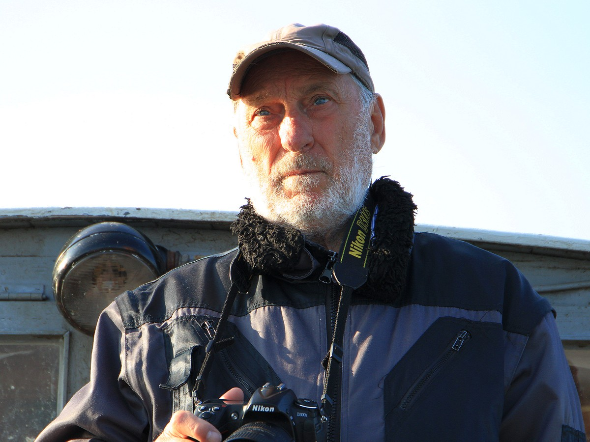 Porträtfotografie des einarmigen Naturfotografen Hans-Dieter Graf, Waren (Müritz)